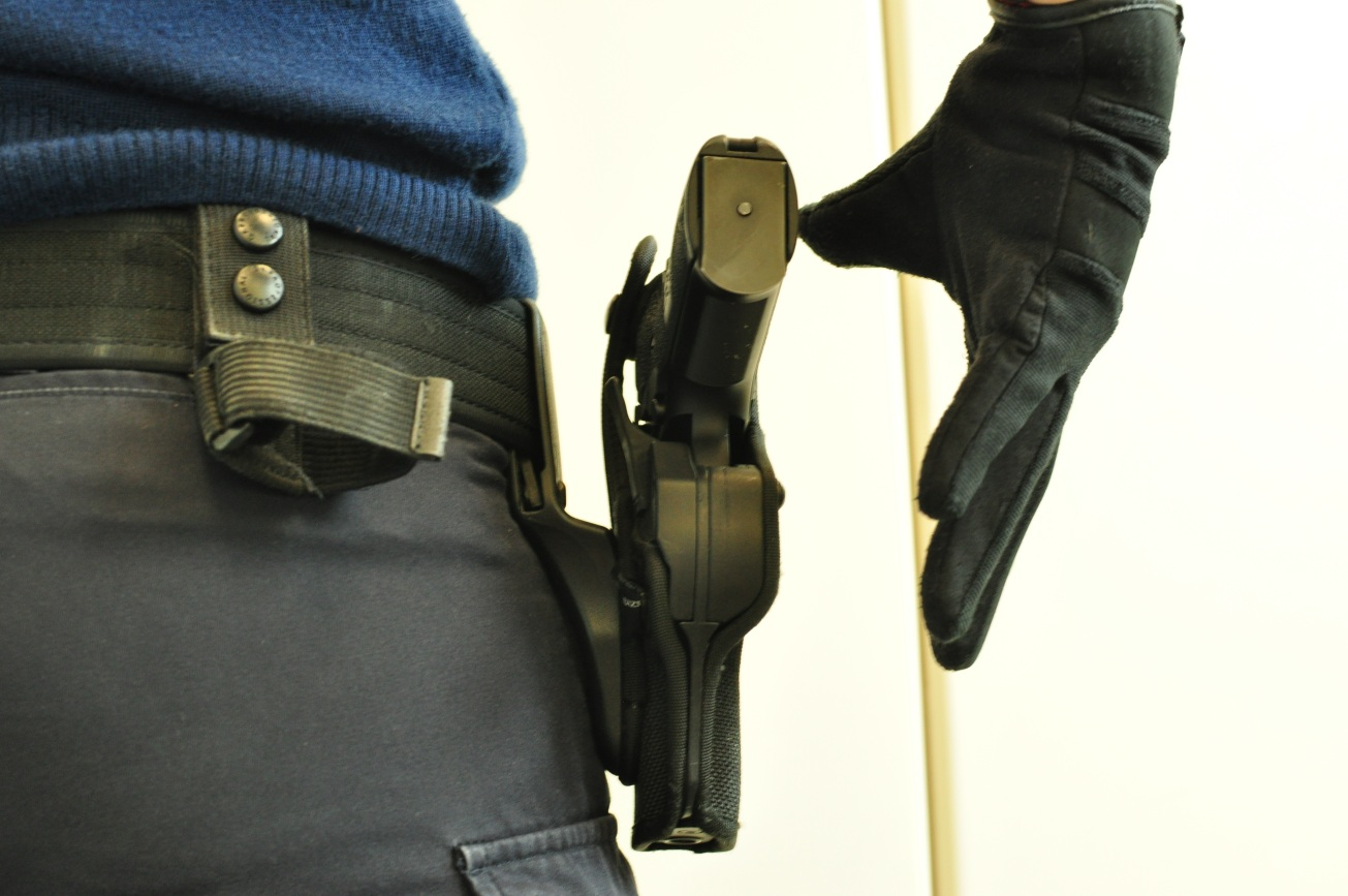 houding wapen